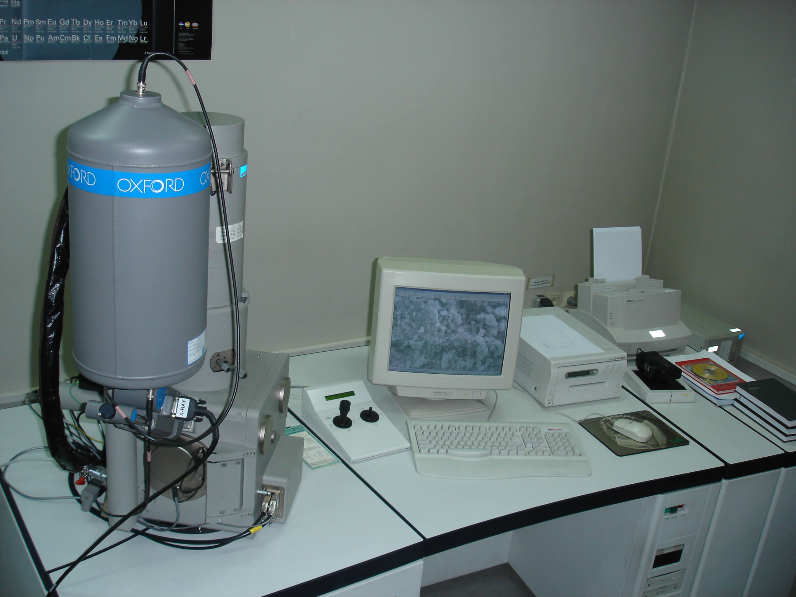 میکروسکوپ الکترونی روبشی OXFORD Leo 440i - دانشگاه تبریز - دانشکده مهندسی ساخت و تولید